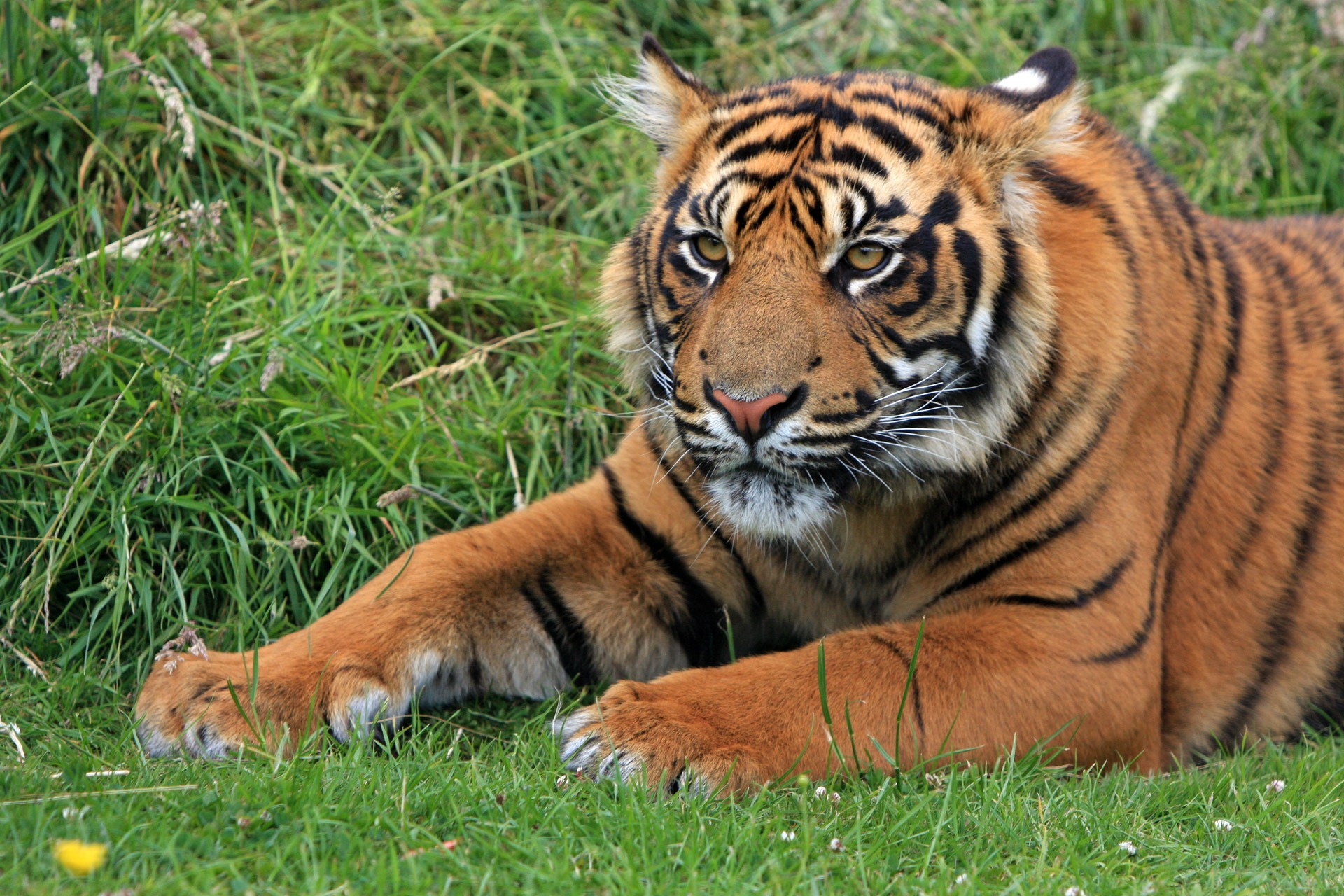 Tigre de Sumatra